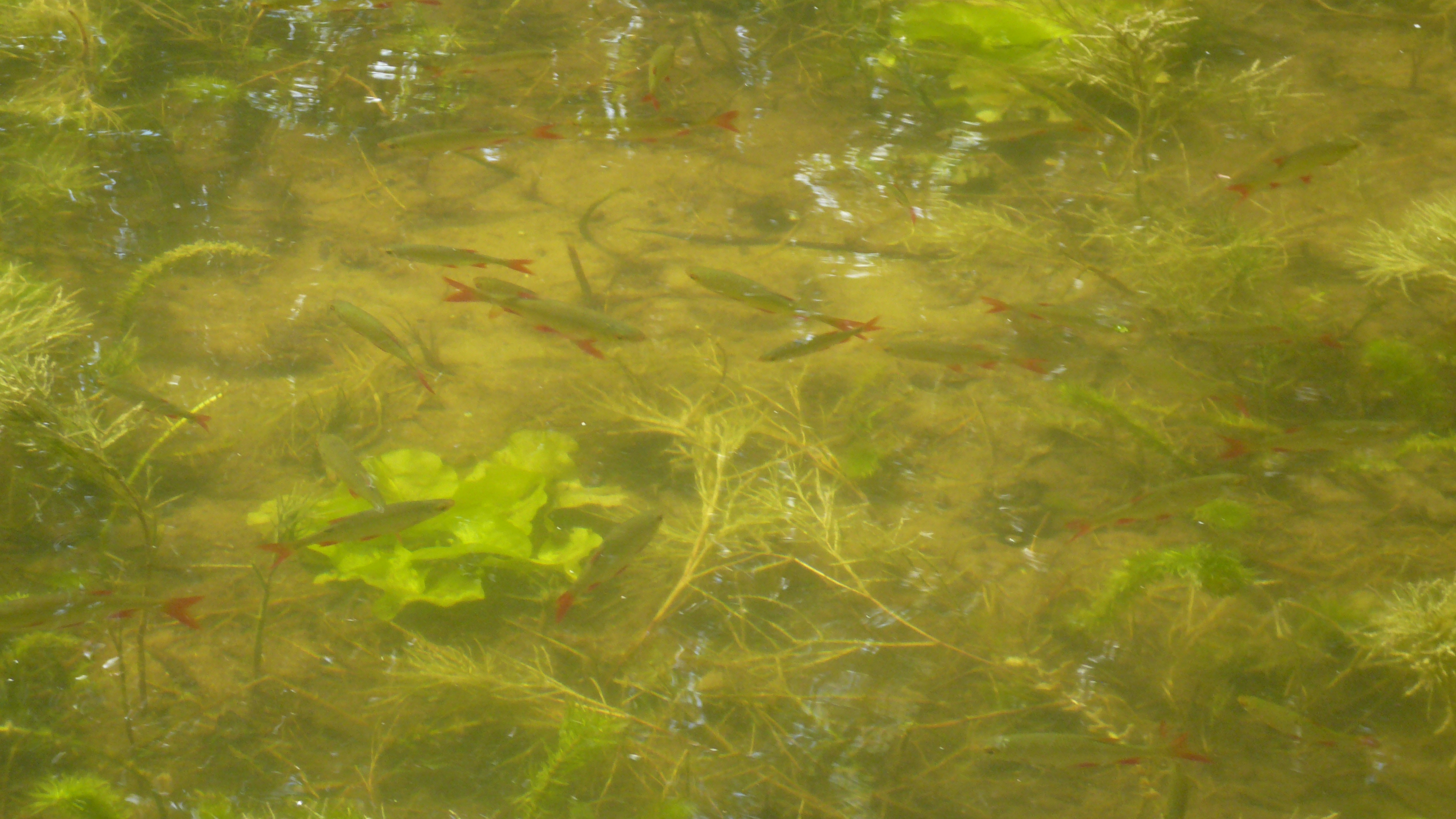 Stado wzdręg w jeziorze Ostrów na Pojezierzu Myśliborskim. Między roślinnością widoczne podwodne liście lilii wodnej, prawdopodobnie grążela żółtego